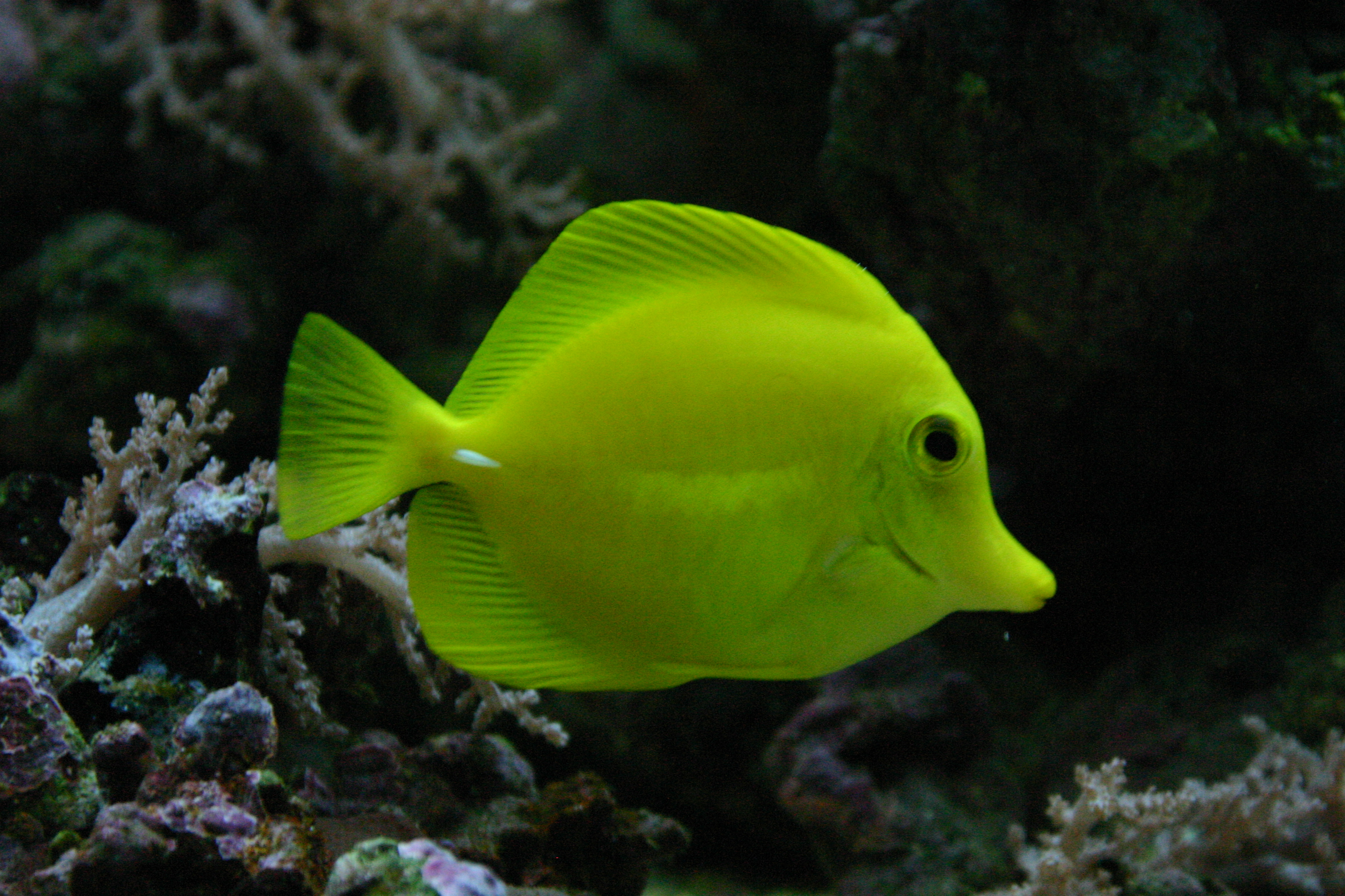 Zebrasoma flavescens en un acuario